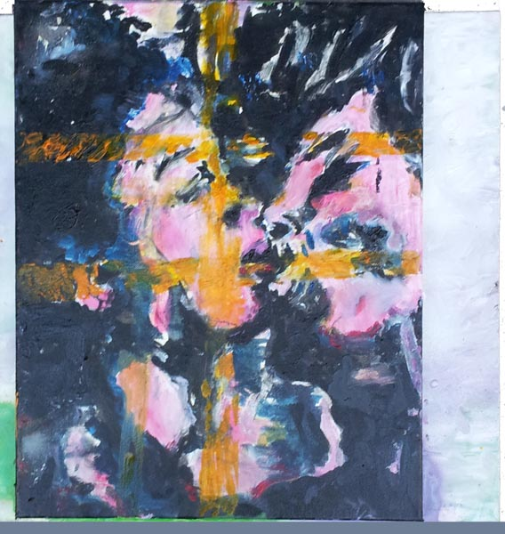 Öl auf Leinwand